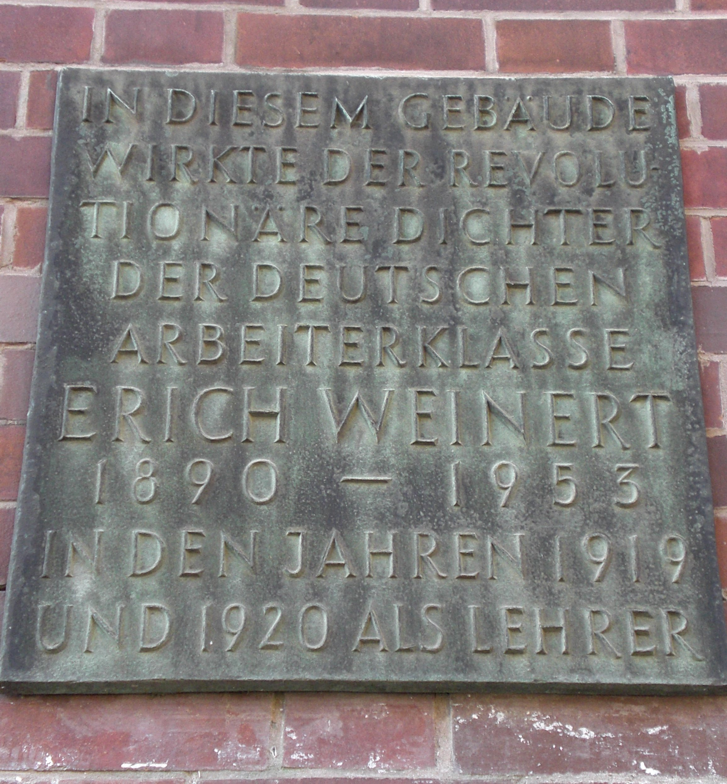 Gedenktafel für Erich Weinert am Gebäude der ehemaligen Kunstgewerbe- und Handwerkerschule Magdeburg